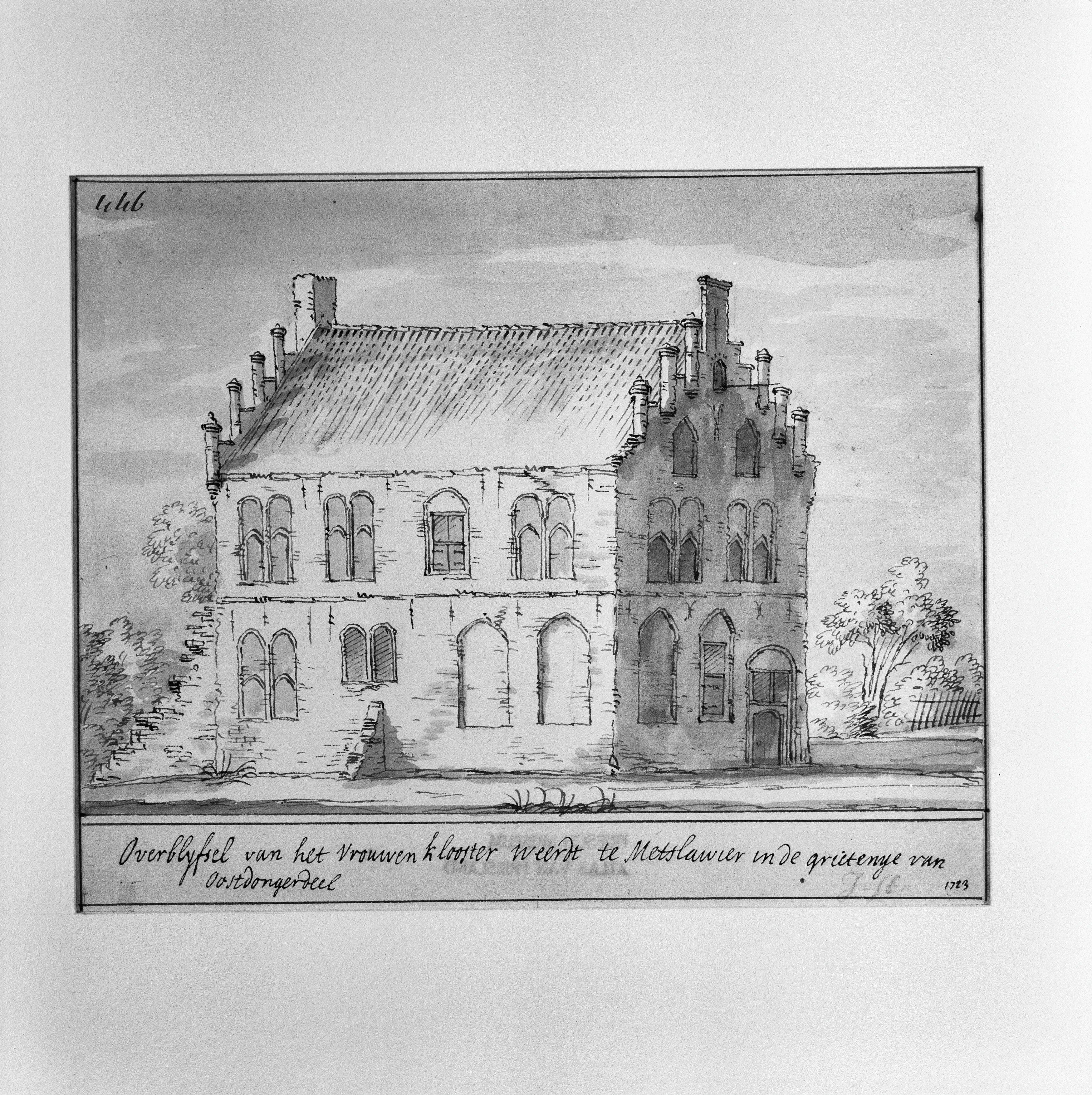 Diversen: Vrouwenklooster Weerdt, 1723, tekening Stellingwerf Collectie Fries Museum